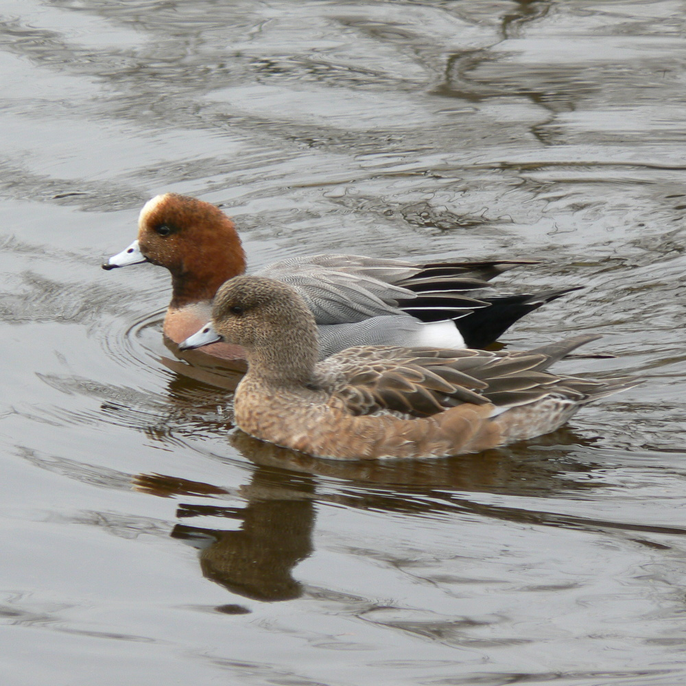 ヒドリガモ, Anas penelope